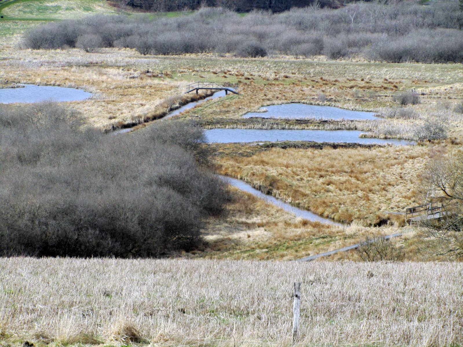 Moser ved Grejs Å øst på udspringet i Fårup Sø